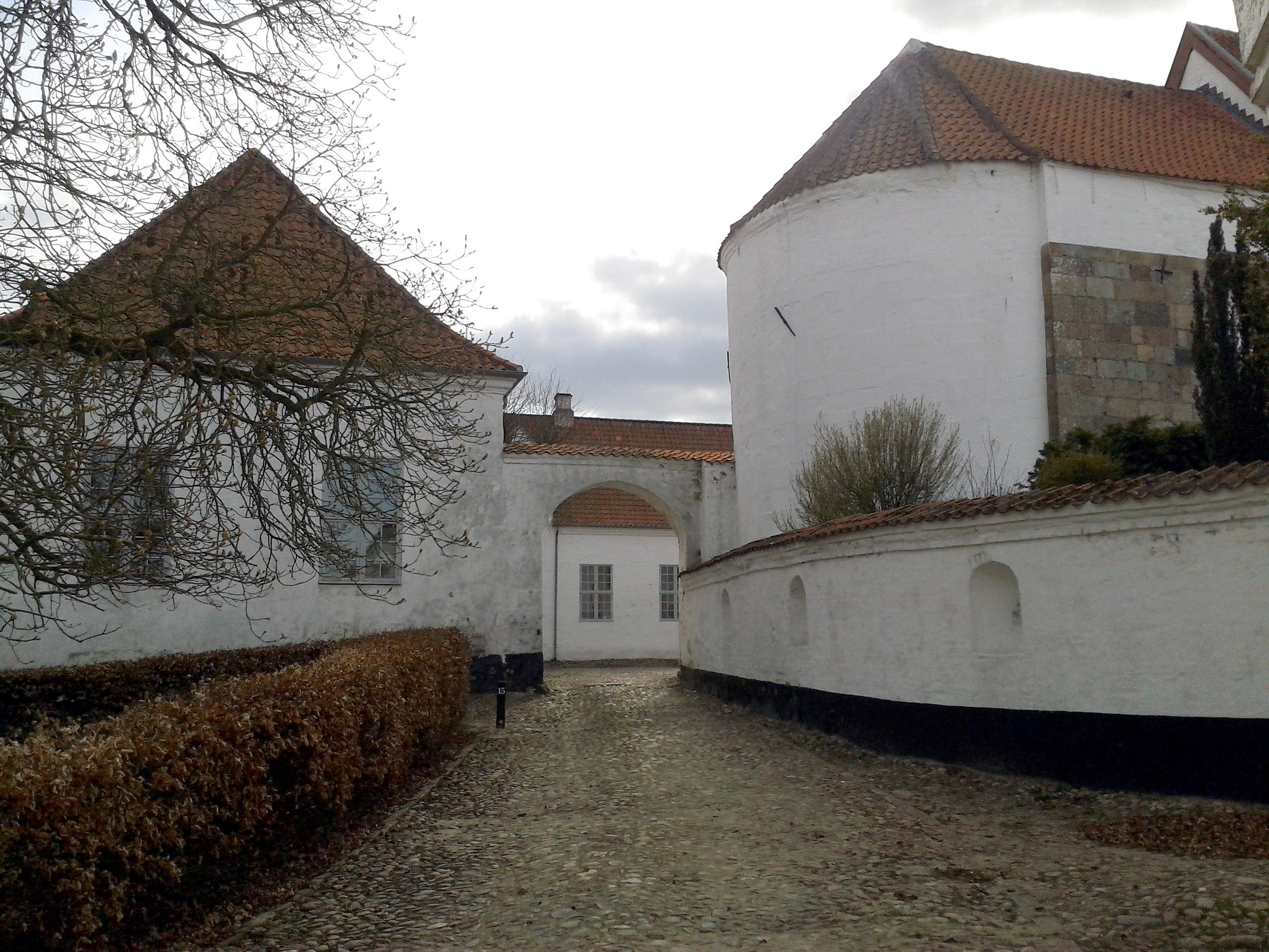 Ørslev Kloster set fra nord